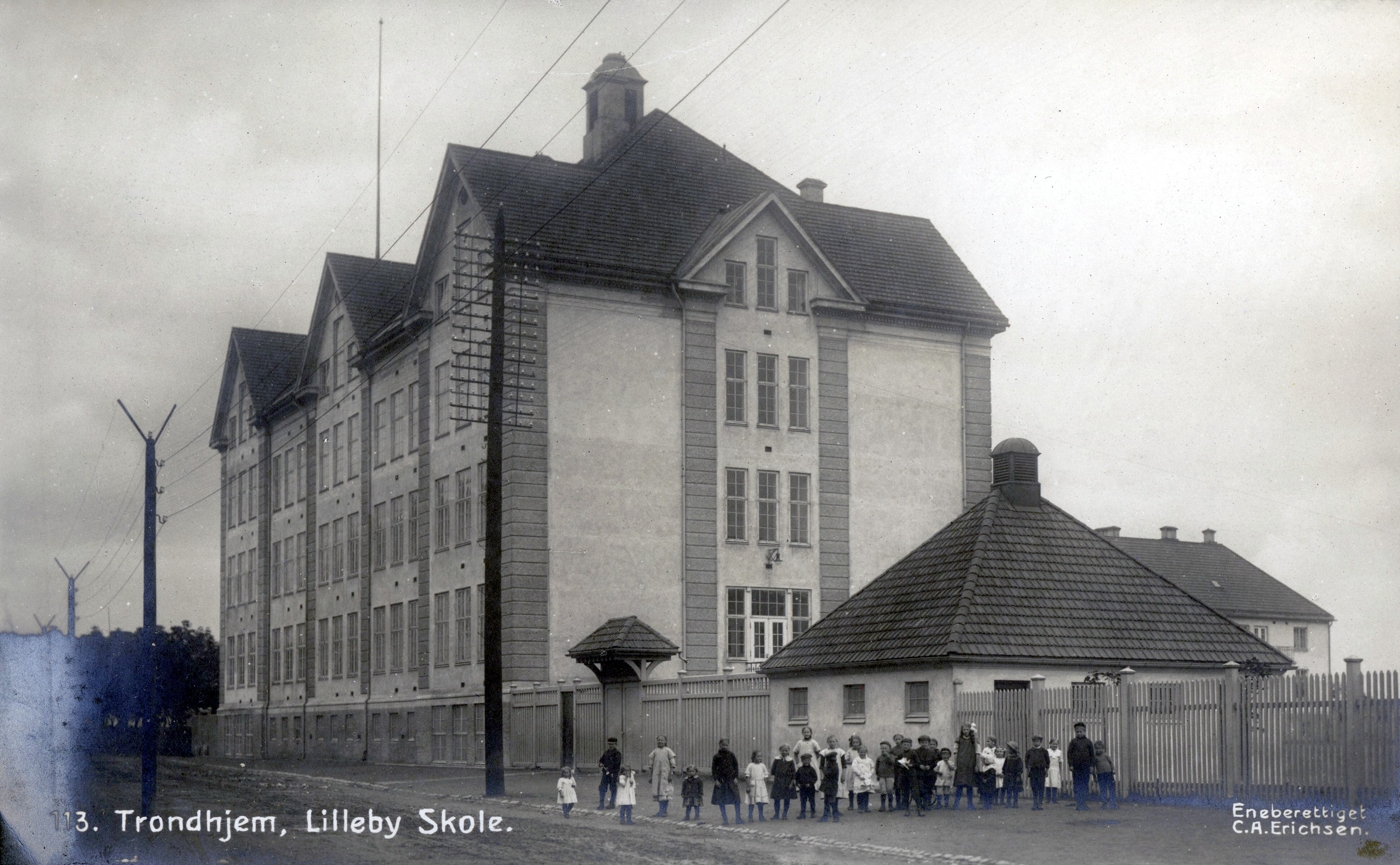 Format: Postkort. År: Tidlig 1900-tall, ca. 1910 - 1915. Om fotografen: ERICHSEN, C. A. - Drøbak og Bodø ca. 1910. Ett av hans bilder datert 1910 er med i Drøbakboken, og han har fotografert landskaper og brevkort i Bodø omtrent samtidig. Hentet fra Bonge, Susanne: Eldre norske fotografer. Fotografer og amatørfotografer i Norge frem til 1920 (Universitetsbiblioteket i Bergen)